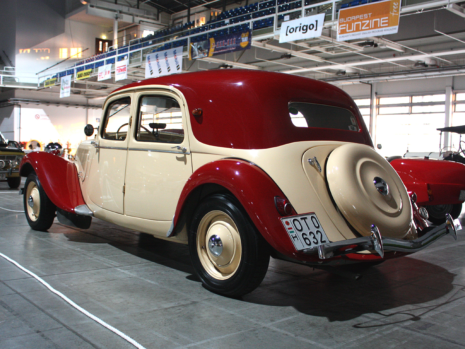 Citroen 11 CV